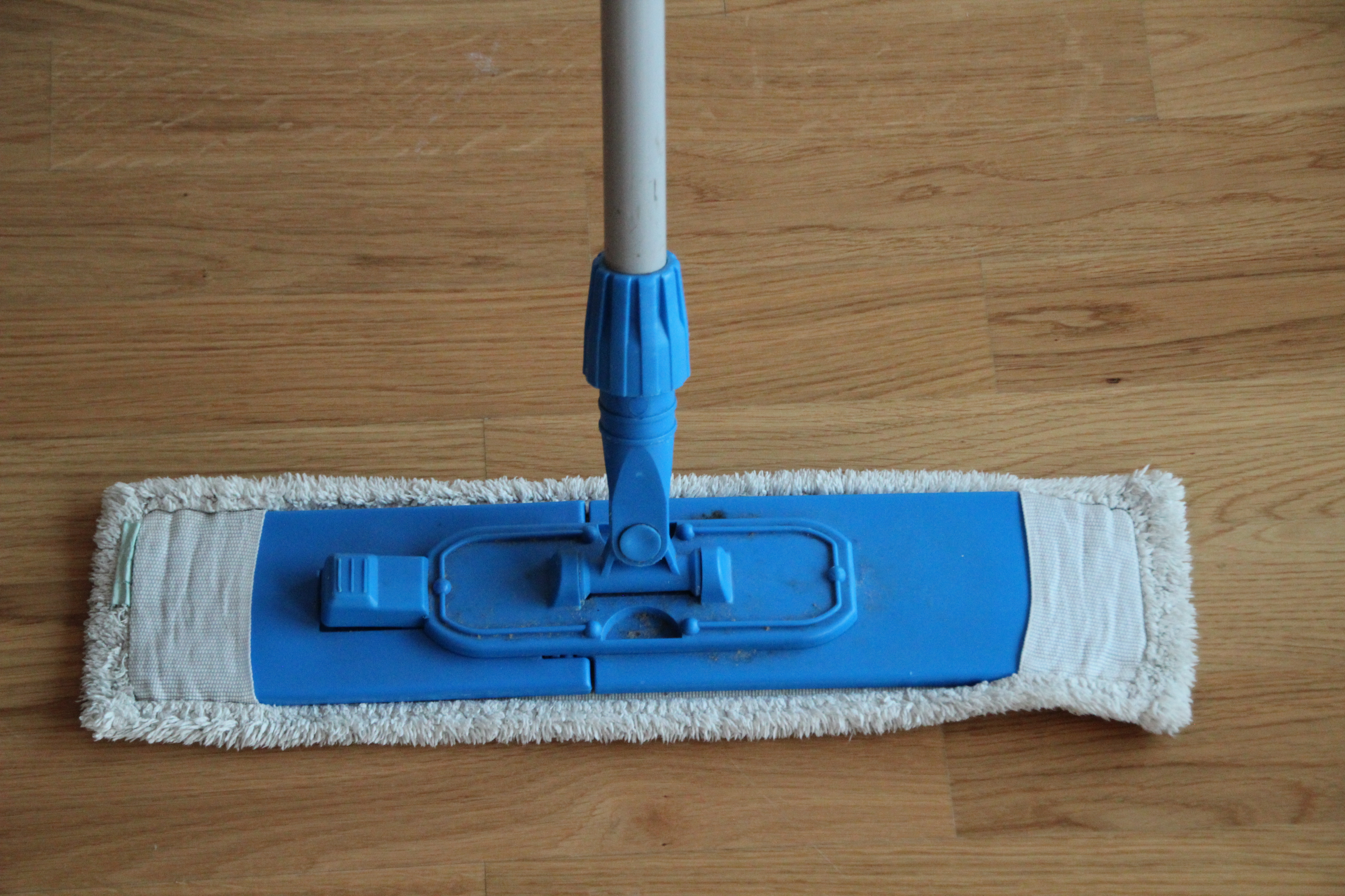 Bildinhalt: Wischmopp für den Haushalt, 40 cm breit, mit trockenem Tuch Aufnahmeort: Frankfurt am Main, Deutschland